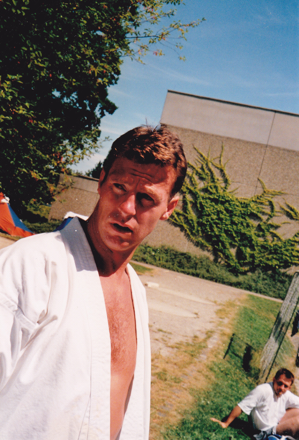 Pat McKay als Trainer beim Karate-Sommerlager 1990 in Ravensburg